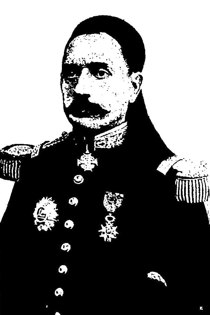 Portrait de Taïeb Djellouli, ministre et grand vizir tunisien